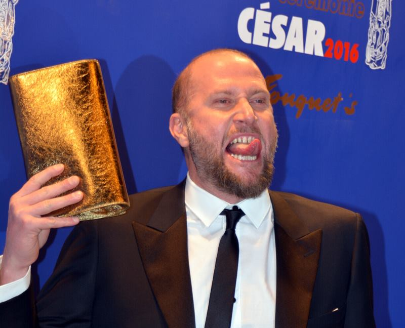 François Damiens à la cérémonie des César